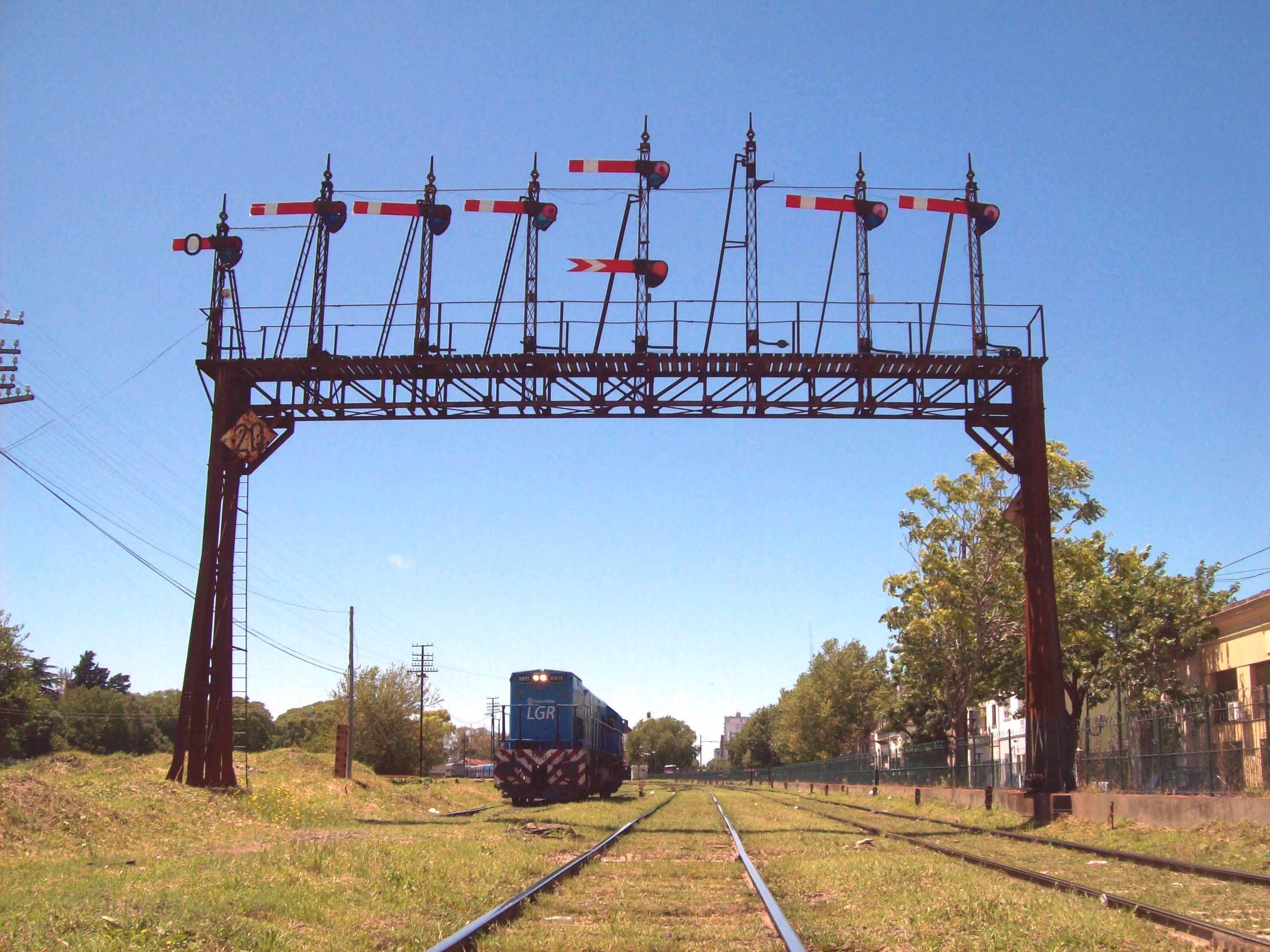 Playa de maniobras de la Estación La Plata, 2014.